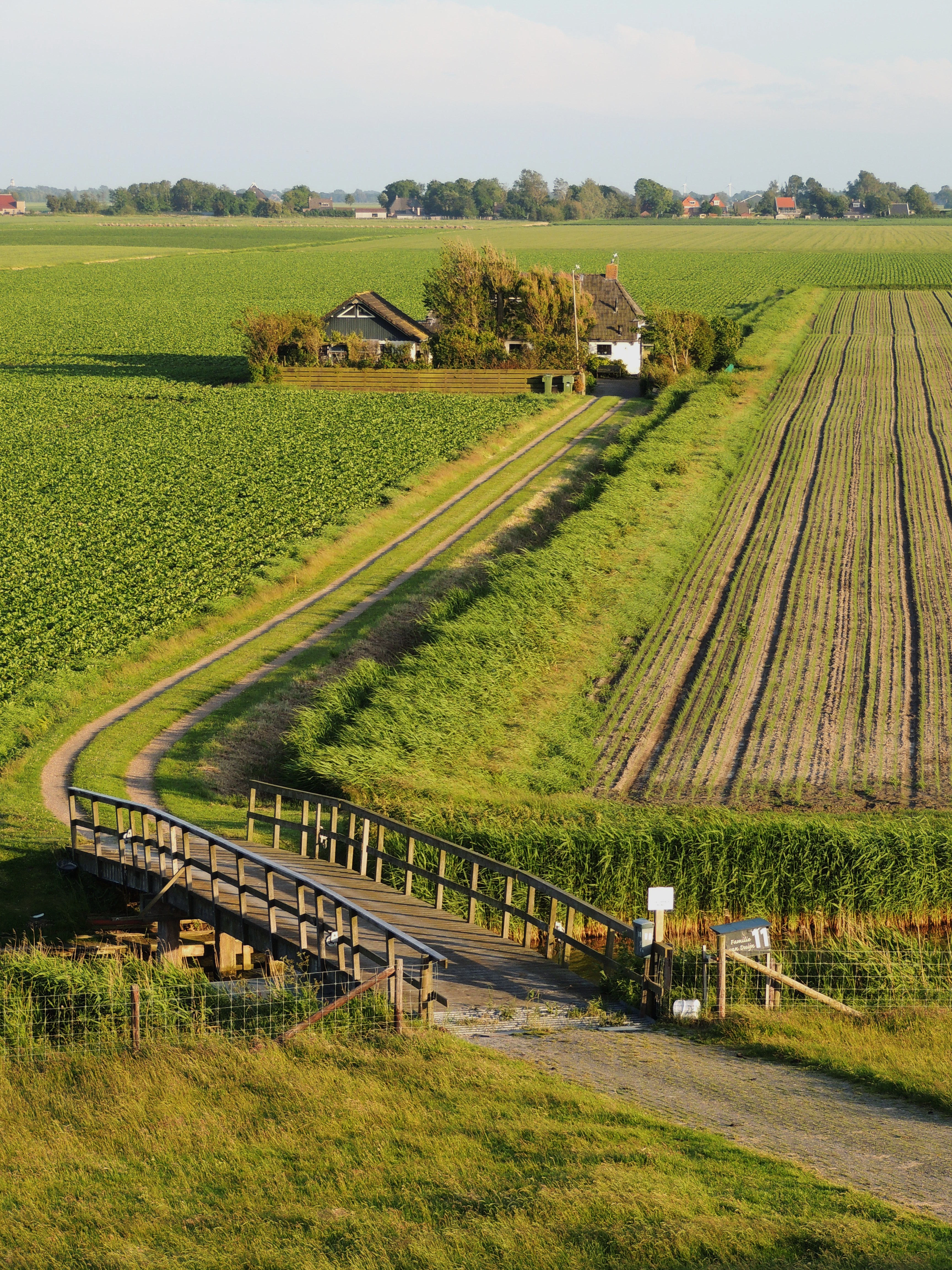 Huis met nr.11 Zwartehaan